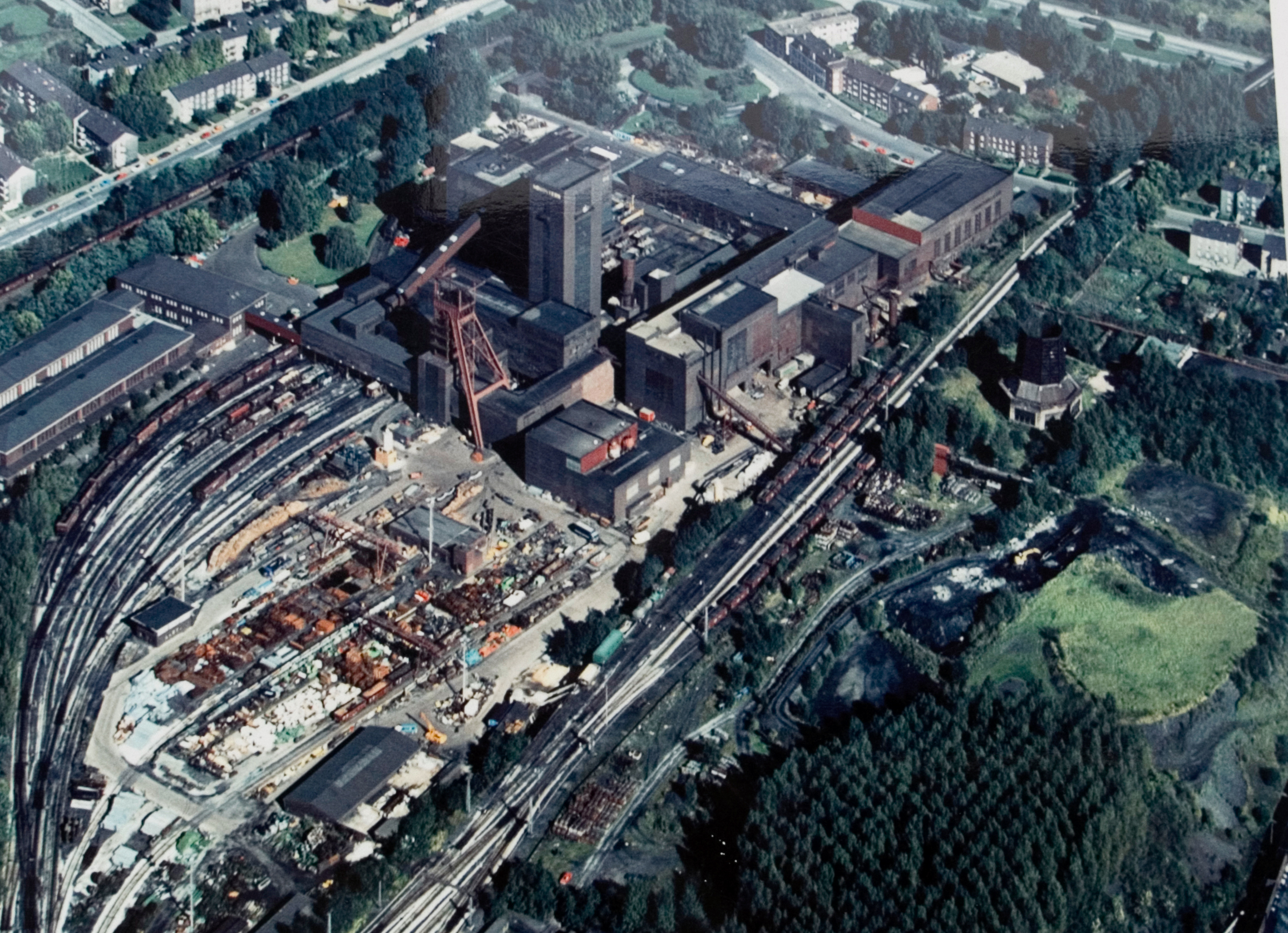 Северный Рейн-Вестфалия, Гельзенкирхен - шахта "Нордштерн" (1981 год)